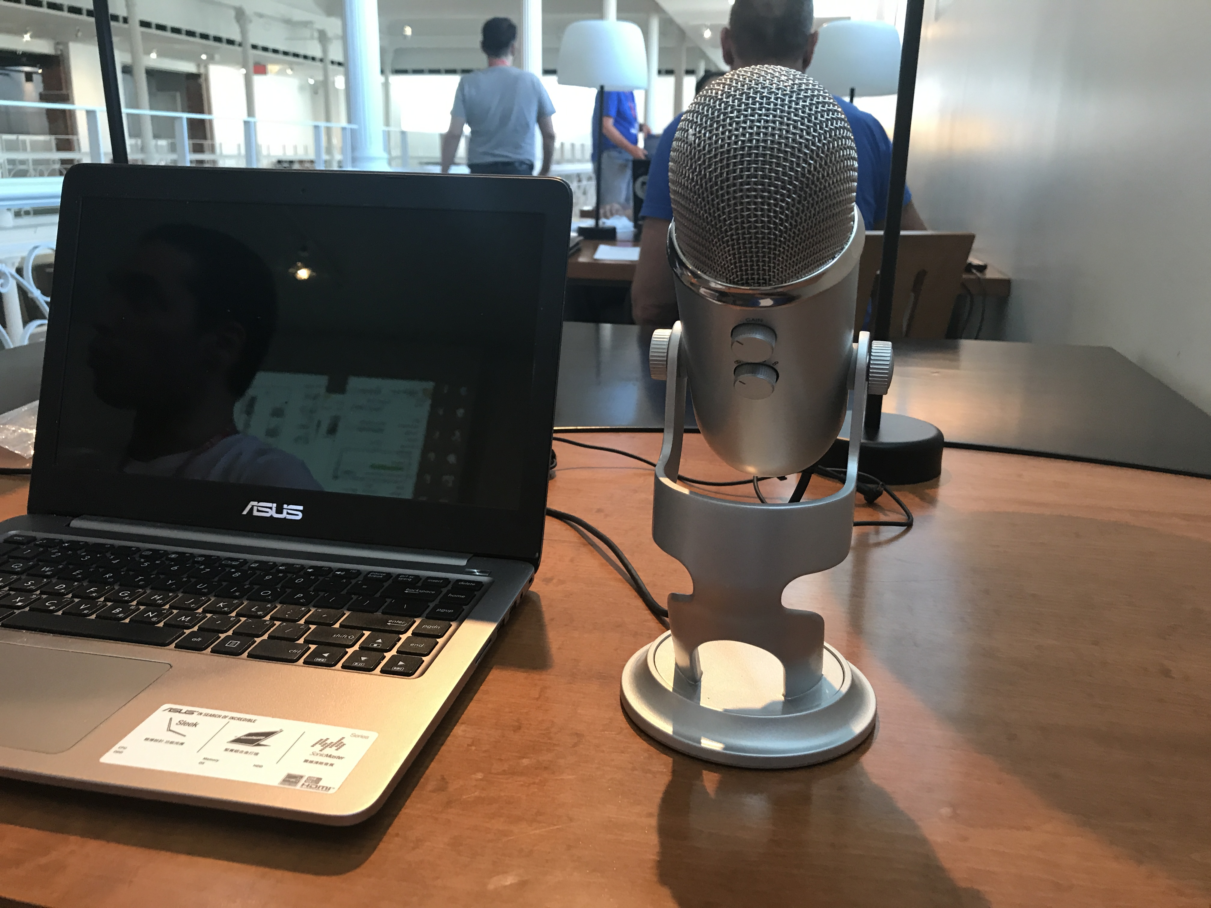 Wikimania formation lingualibreEuskara: Wikimania Lingua Libre prestakuntza saio bat, Montreal